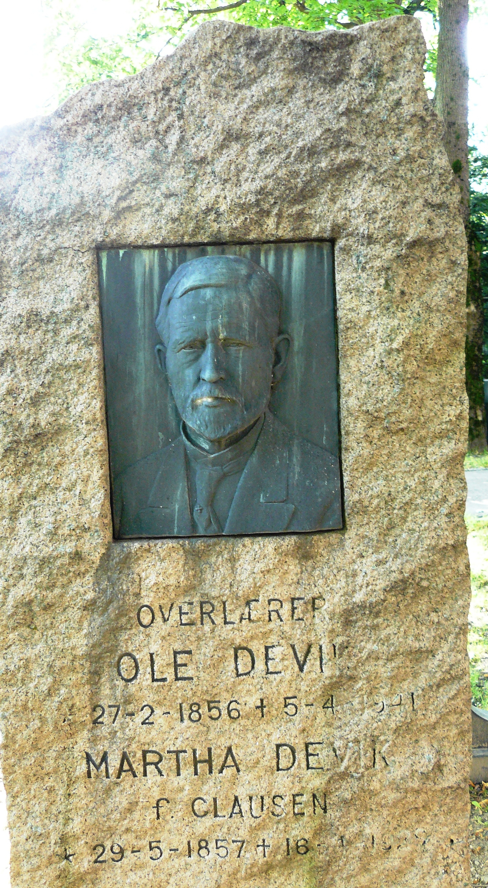 Ole Deviks gravestone, Oslo